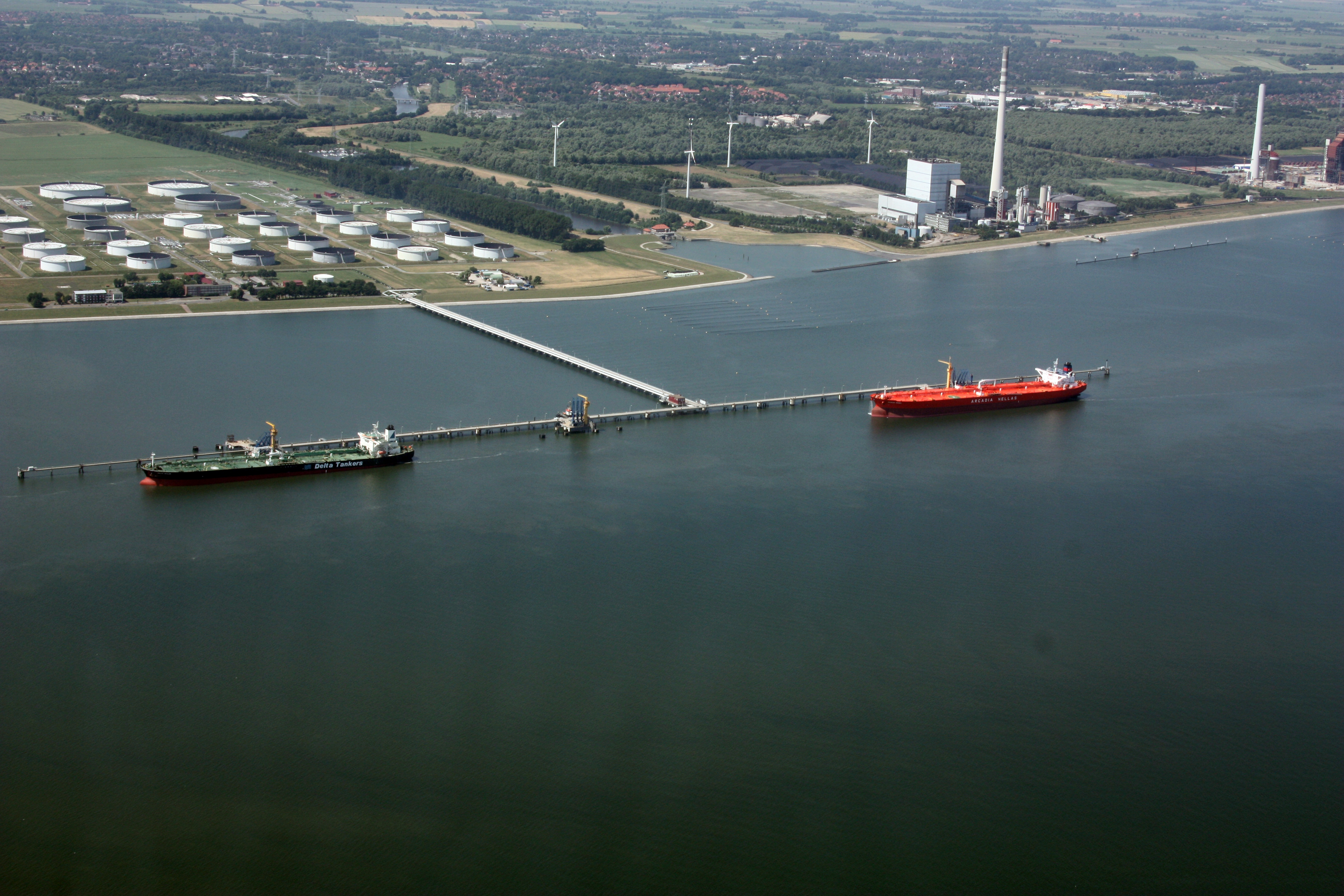 Flug über den Jadebusen und Wilhelmshaven, von Nord nach Süd; weiter nachOldenburg; Flughöhe 500 m = 1500 ft; Juli 2010